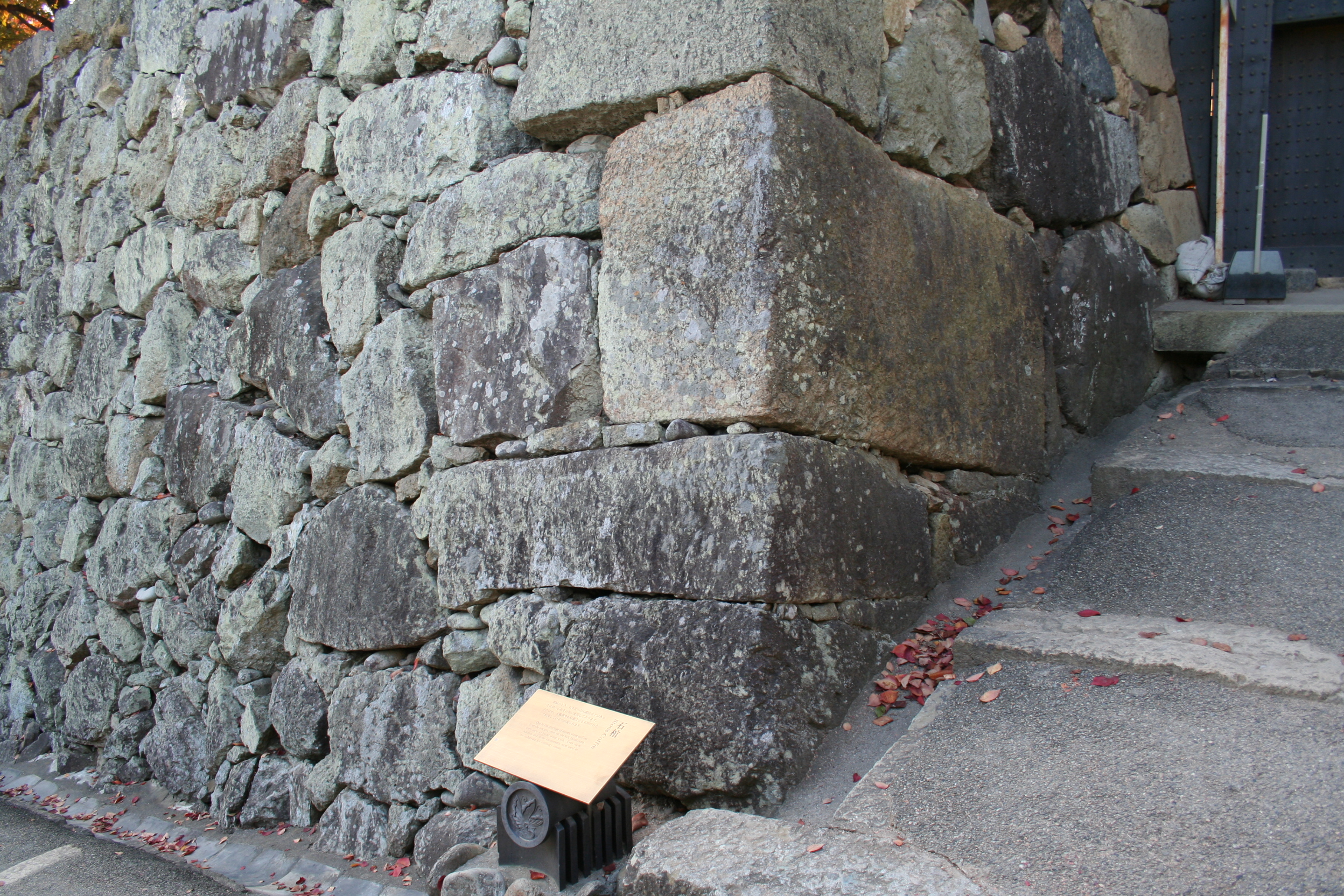 2009年秋の姫路城。 古代の石棺が使われている石垣。